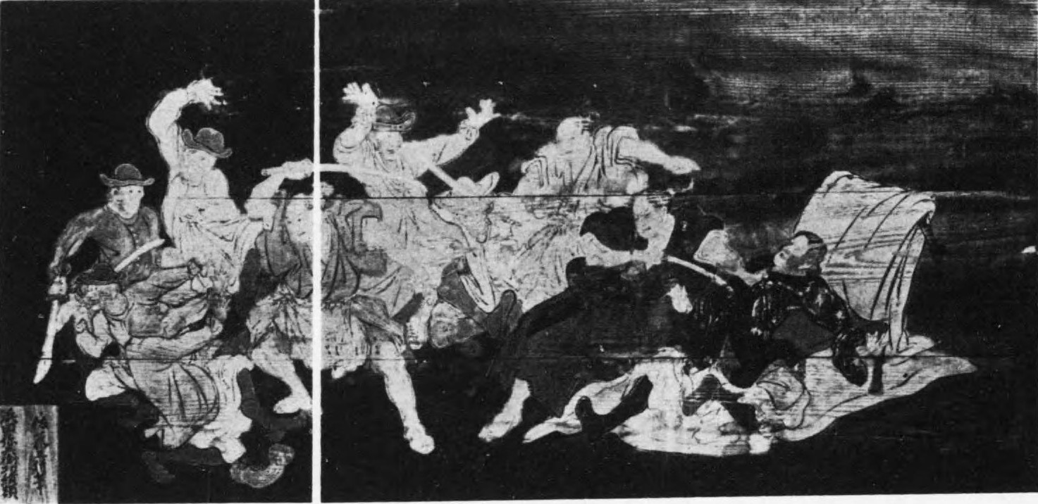 『浜田弥兵衛功績図』 姫路市射楯兵主神社蔵